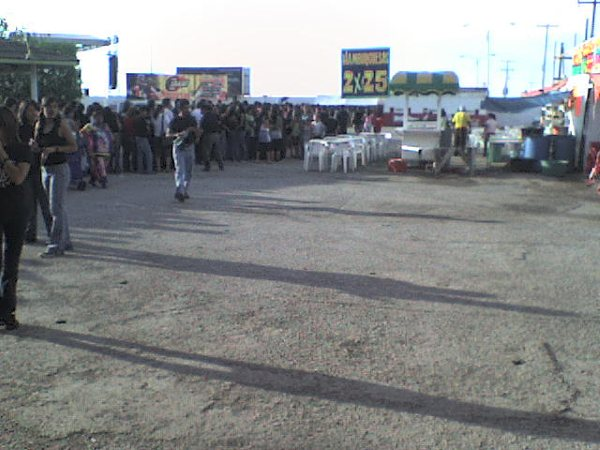 Feria del Algodon